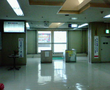 十和田観光電鉄 十和田市駅（十鉄ターミナルビル） 2階改札口・コンコース